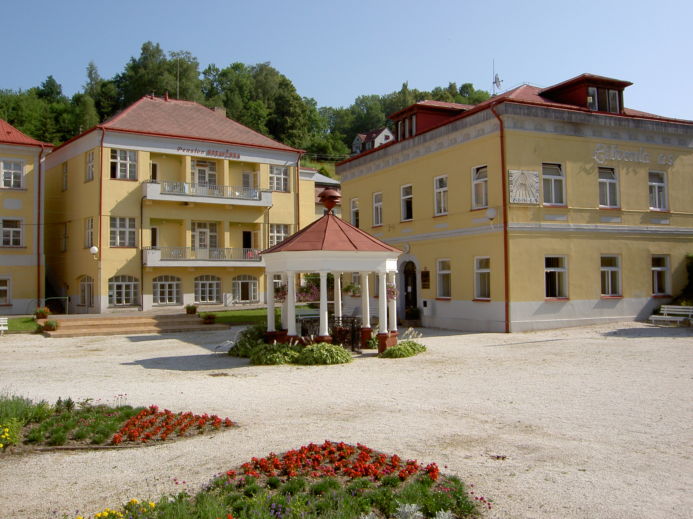 Spa Lázně Libverda in Jizera Mountains, Czech Republic